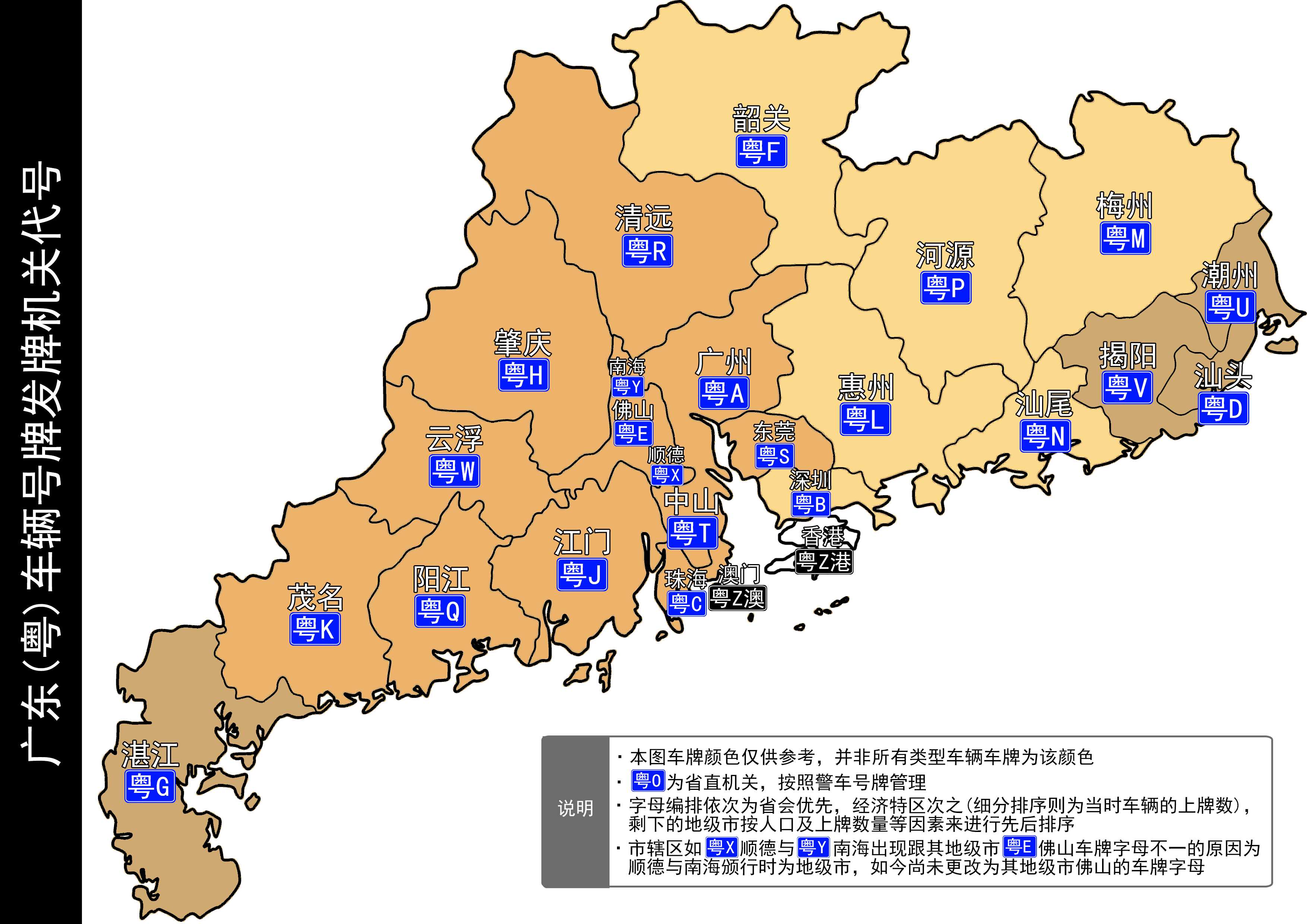 广东(粤)车辆号牌发牌机关代号